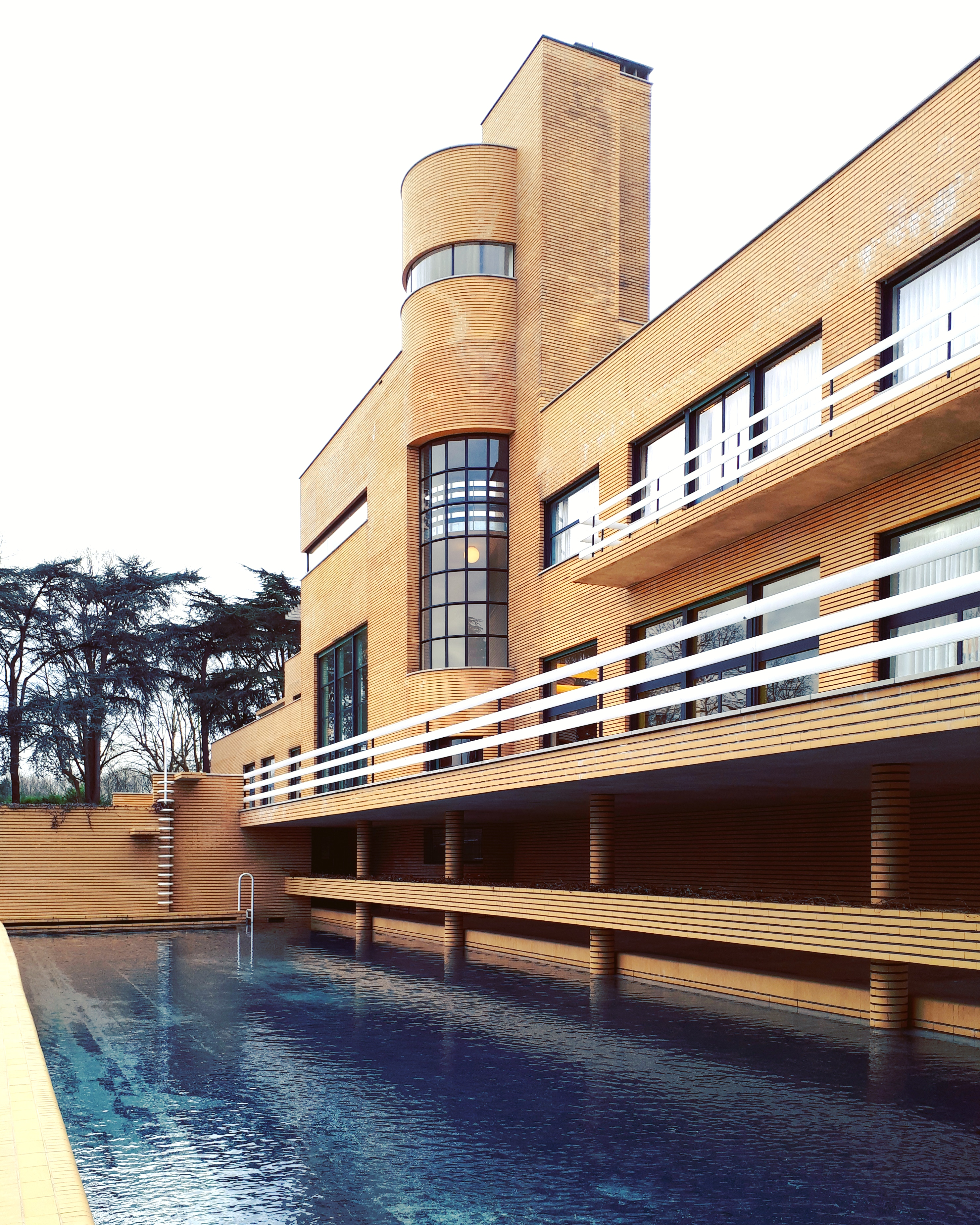 Villa Cavrois: la façade sud et la piscine